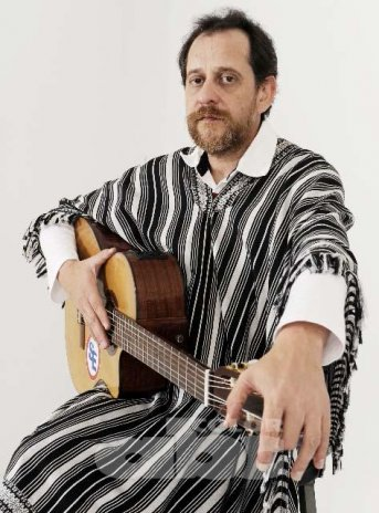 Guitarrista Paraguayo